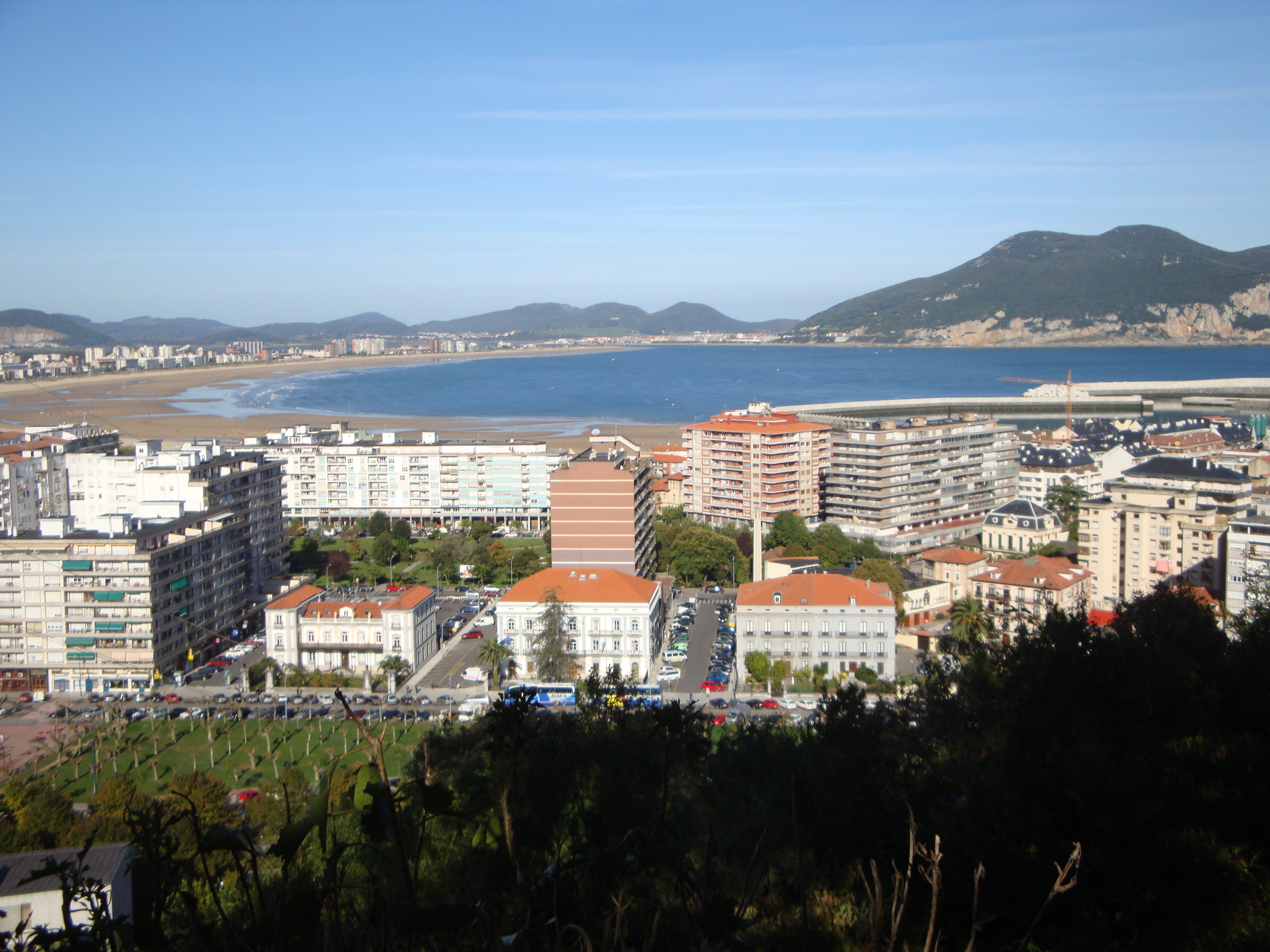 Vista general de Laredo (Cantabria)